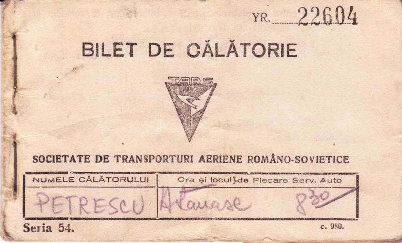 TARS plane ticket